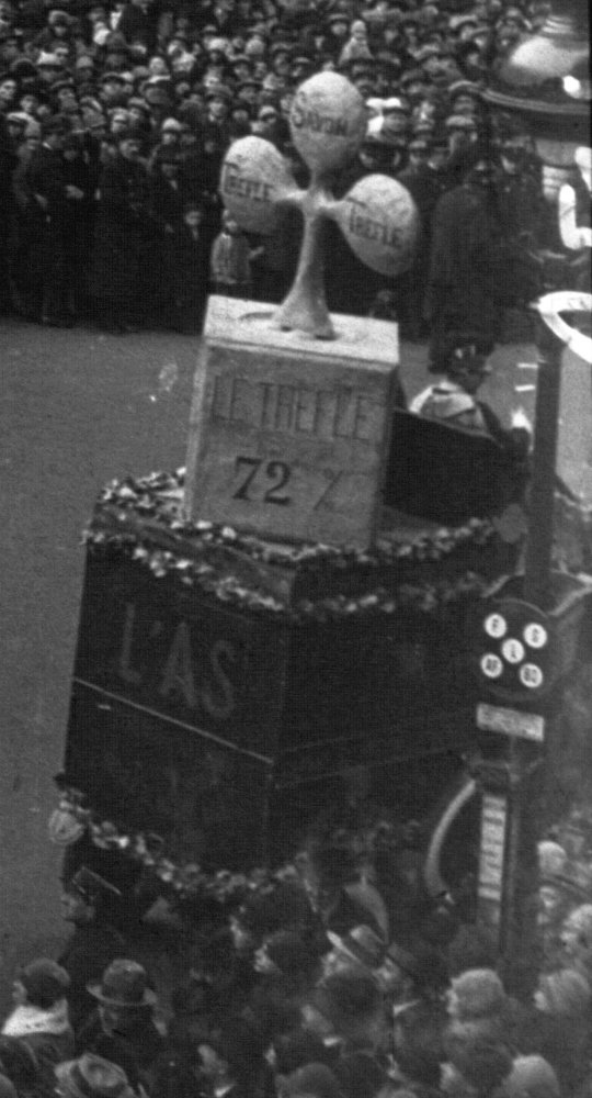 Le char réclame du savon Le Trèfle sur la place de l'Opéra dans le cadre du cortège de la Mi-Carême à Paris 1928.